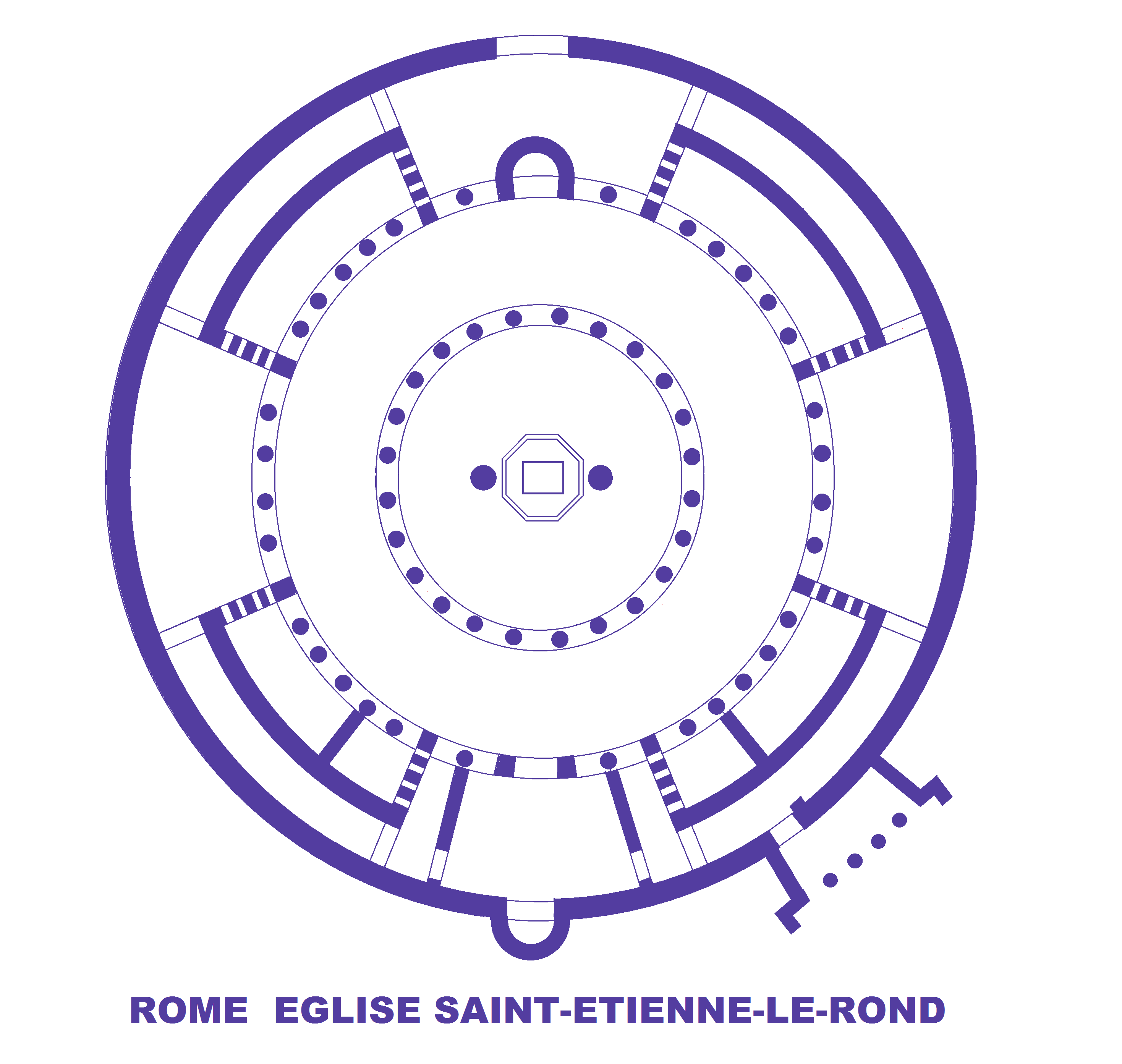 Rome, église Saint-Etienne-le-Rond, plan